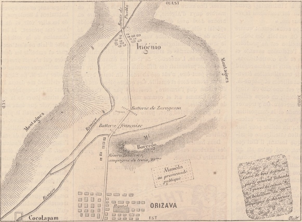 Expédition du Mexique. — Plan du combat de Borrego